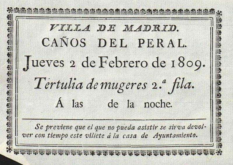 Billete o invitación para asistir a una tertulia cultural (para mujeres) en el Teatro y Corral de Comedias de los Caños del Peral, en el Madrid de 1809.